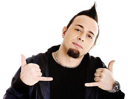 Mitch